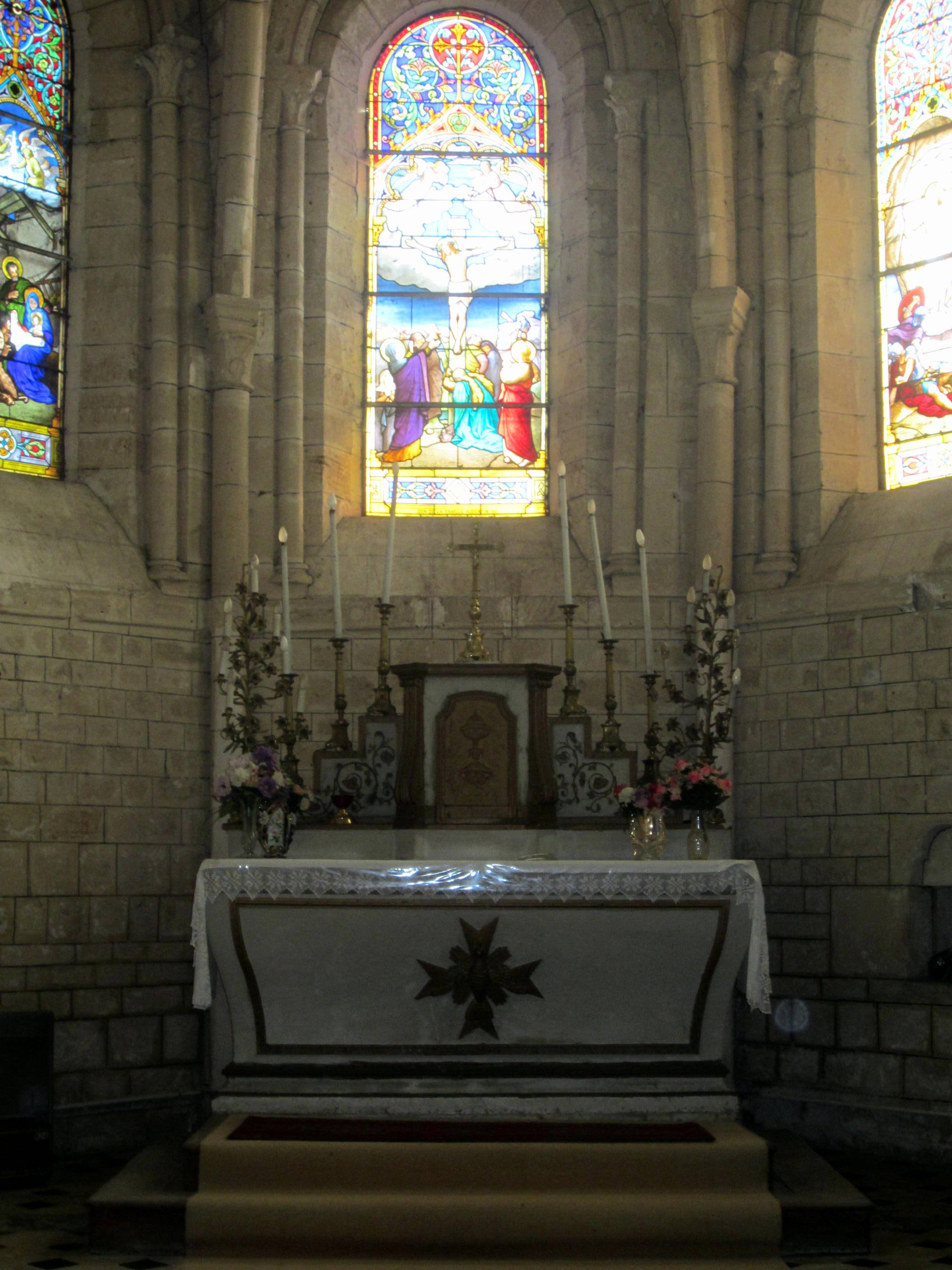 Autel consacré au saint de l'église situé dans le cœur de l'église